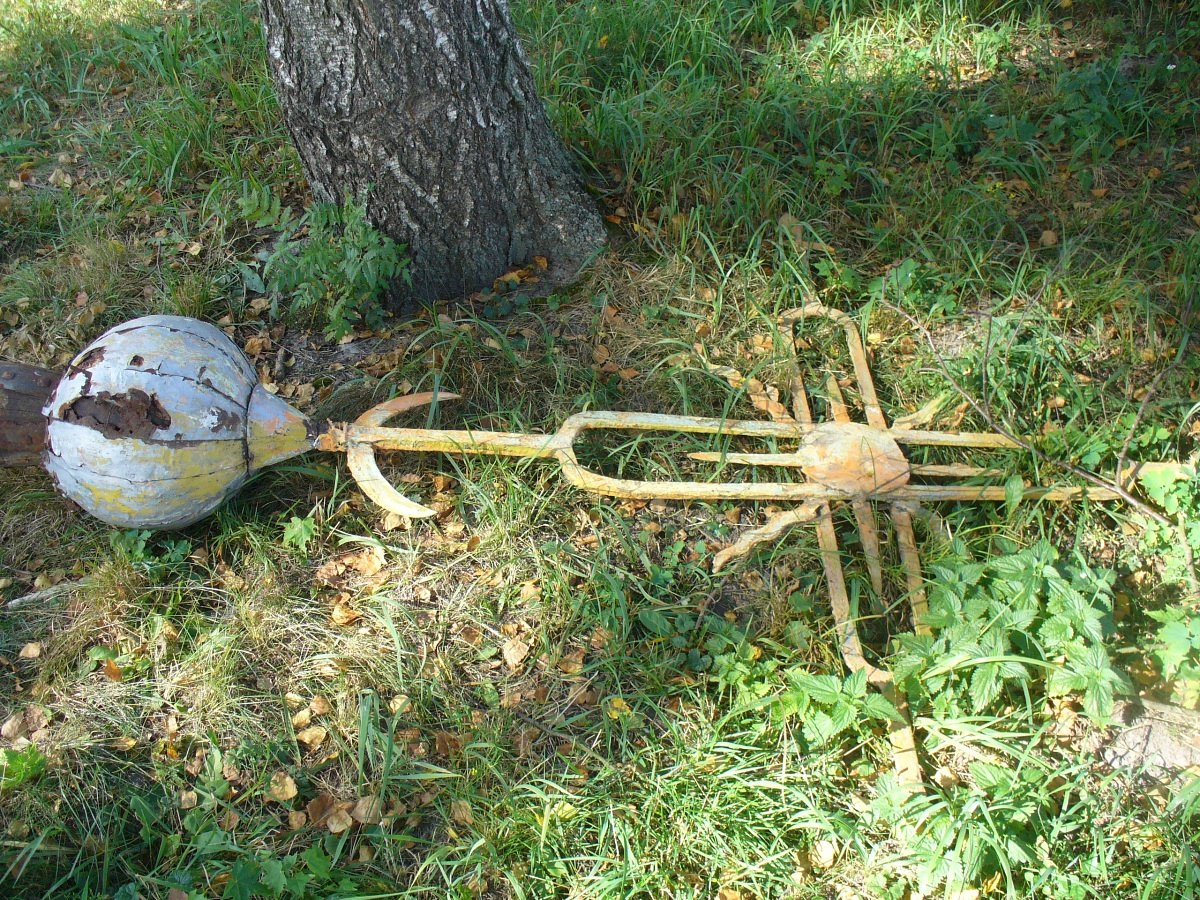 Велямічы. Ільінская царква са званіцай. Антырэстаўрацыя